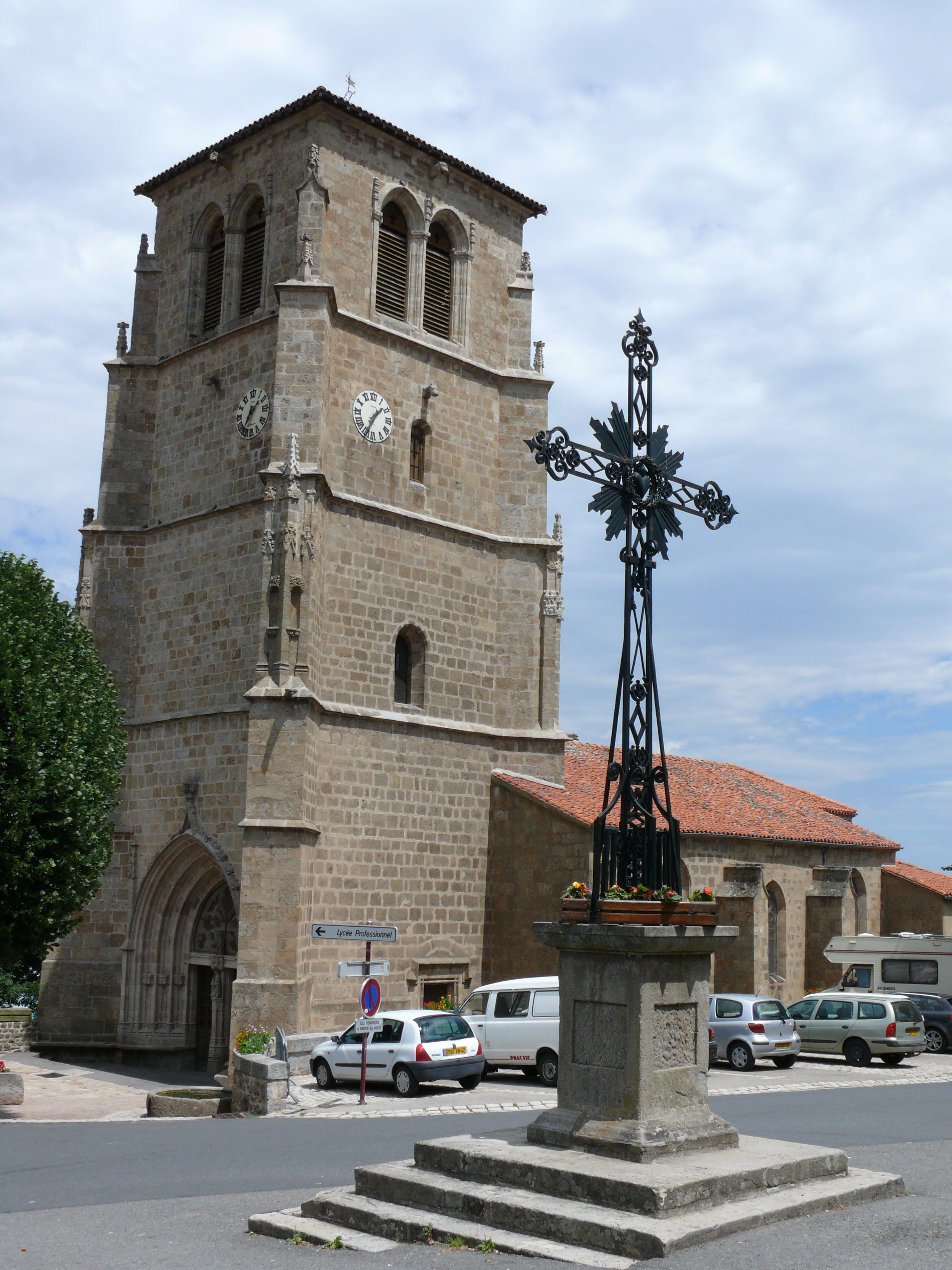 Verrières-en-Forez - Eglise et croix de mission